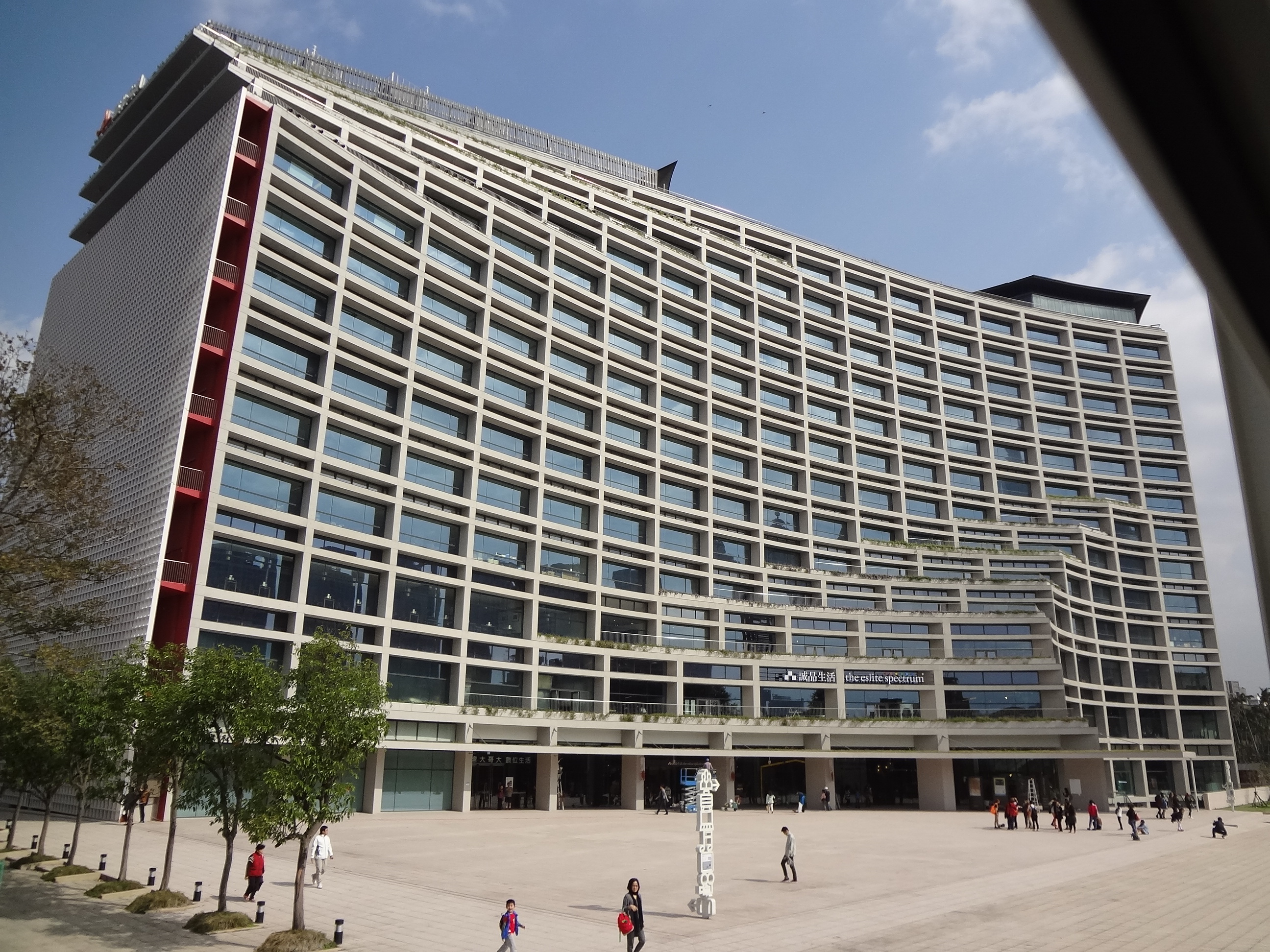 臺北文創大樓，位於臺北市信義區菸廠路88號。拍攝於安益國際展覽公司於臺北市松山文化創意園區展示的老夫子時空叮叮車上層。